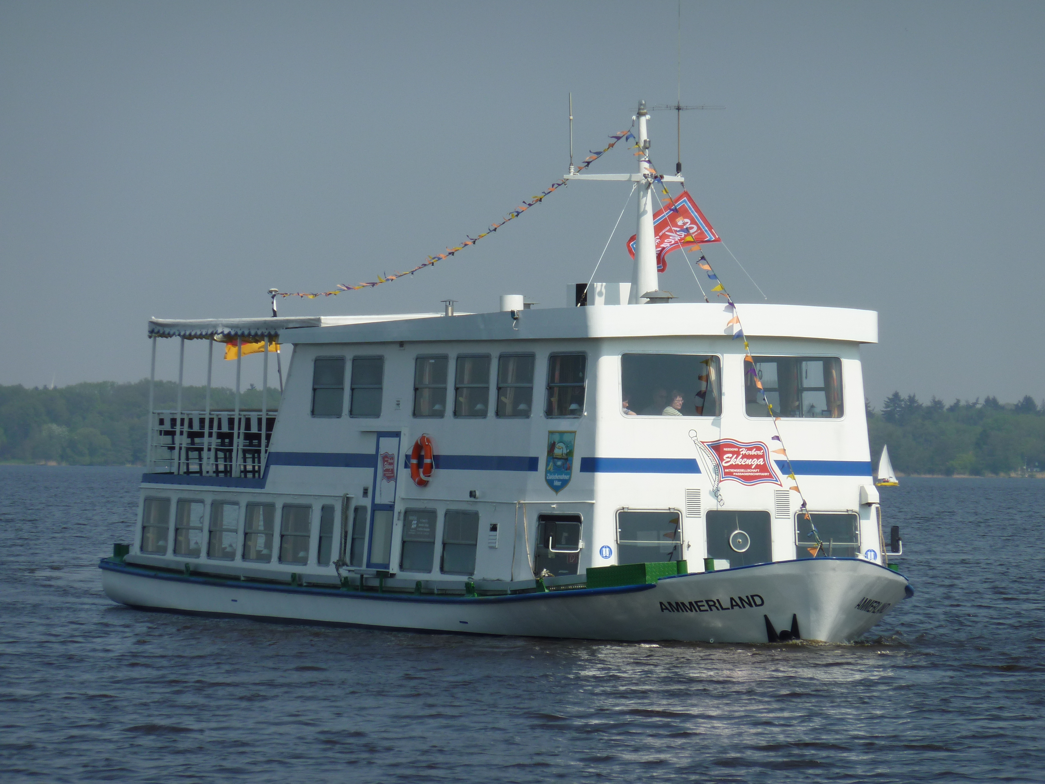 Schiffsverkehr auf dem Zwischenahner Meer